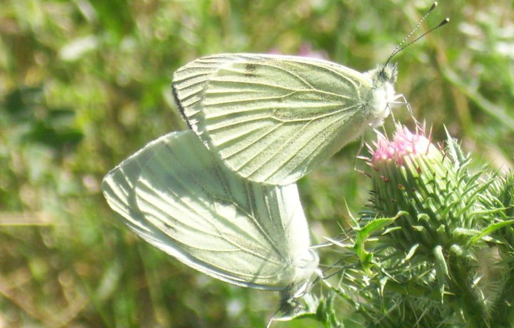 Kjo është një pamje e dy fluturave mjaft unike e fotografuar në Fushën e Kosovës.